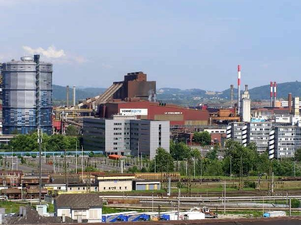 Die Voestalpine in Linz